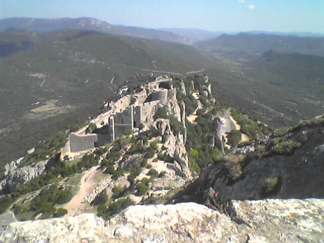 Der untere Teil von Peyrepertuse